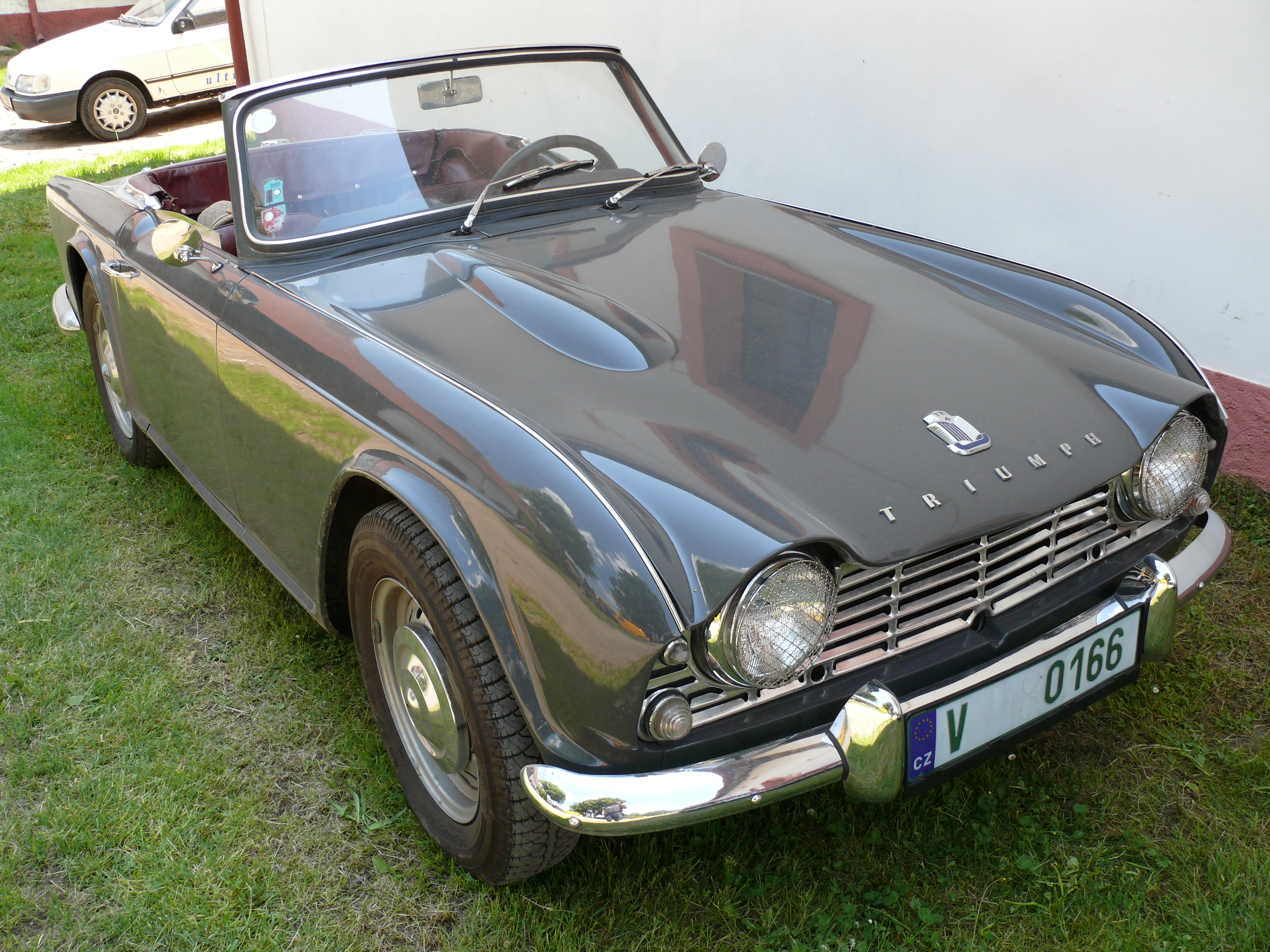 Triumph TR4, Veteránské rojení Lešno 2007